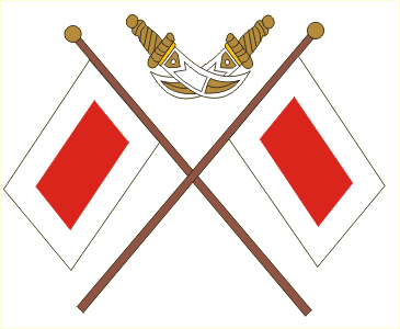 RAK escut